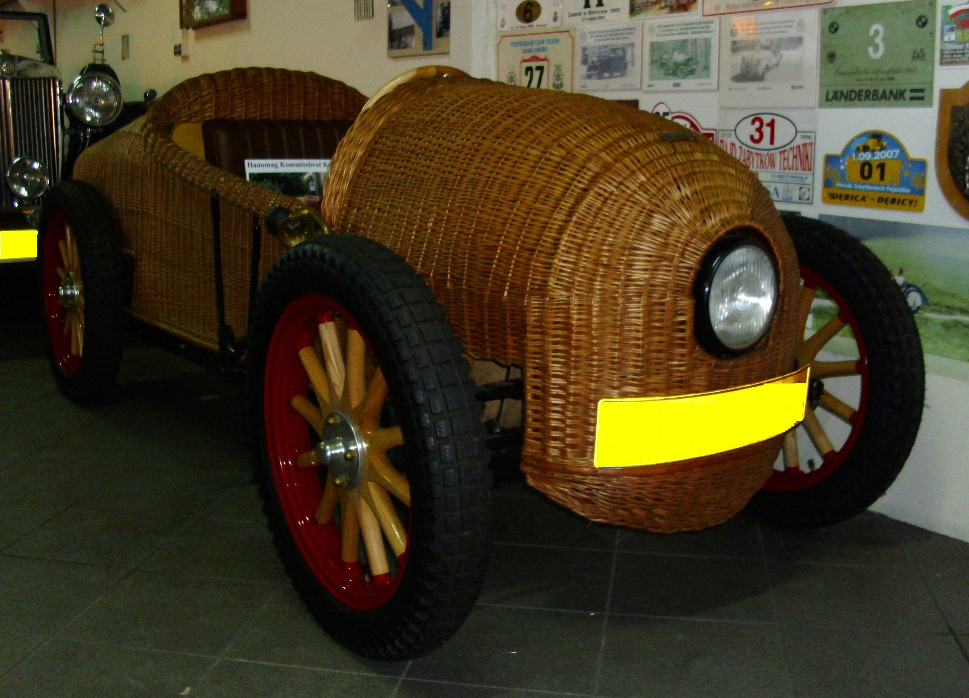 Hanomag 2/10 PS Korbrennwagen 1928